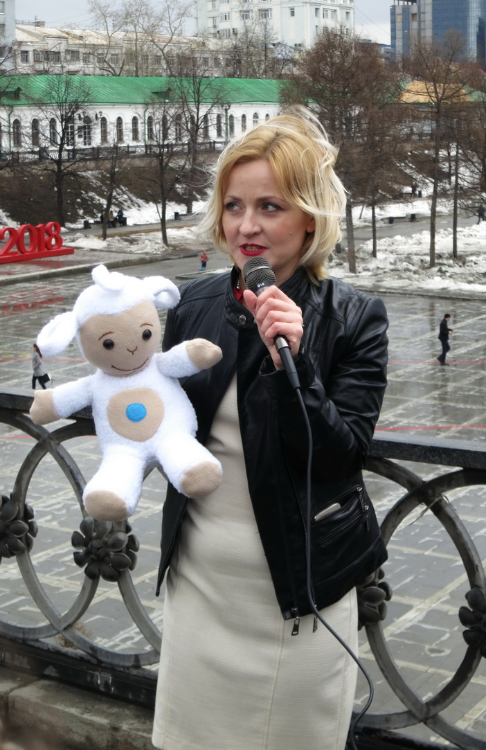 Евгения Чудновец во время антикоррупционных протестов 26 марта 2017 года, вызванных фильмом А.Навального "Он вам не Димон"